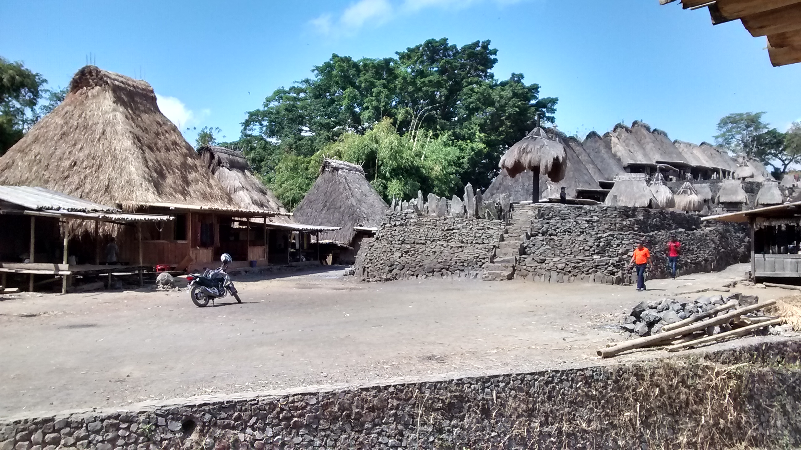 Tiworiwu, Jerebuu, Ngada Regency, East Nusa Tenggara, Indonesia